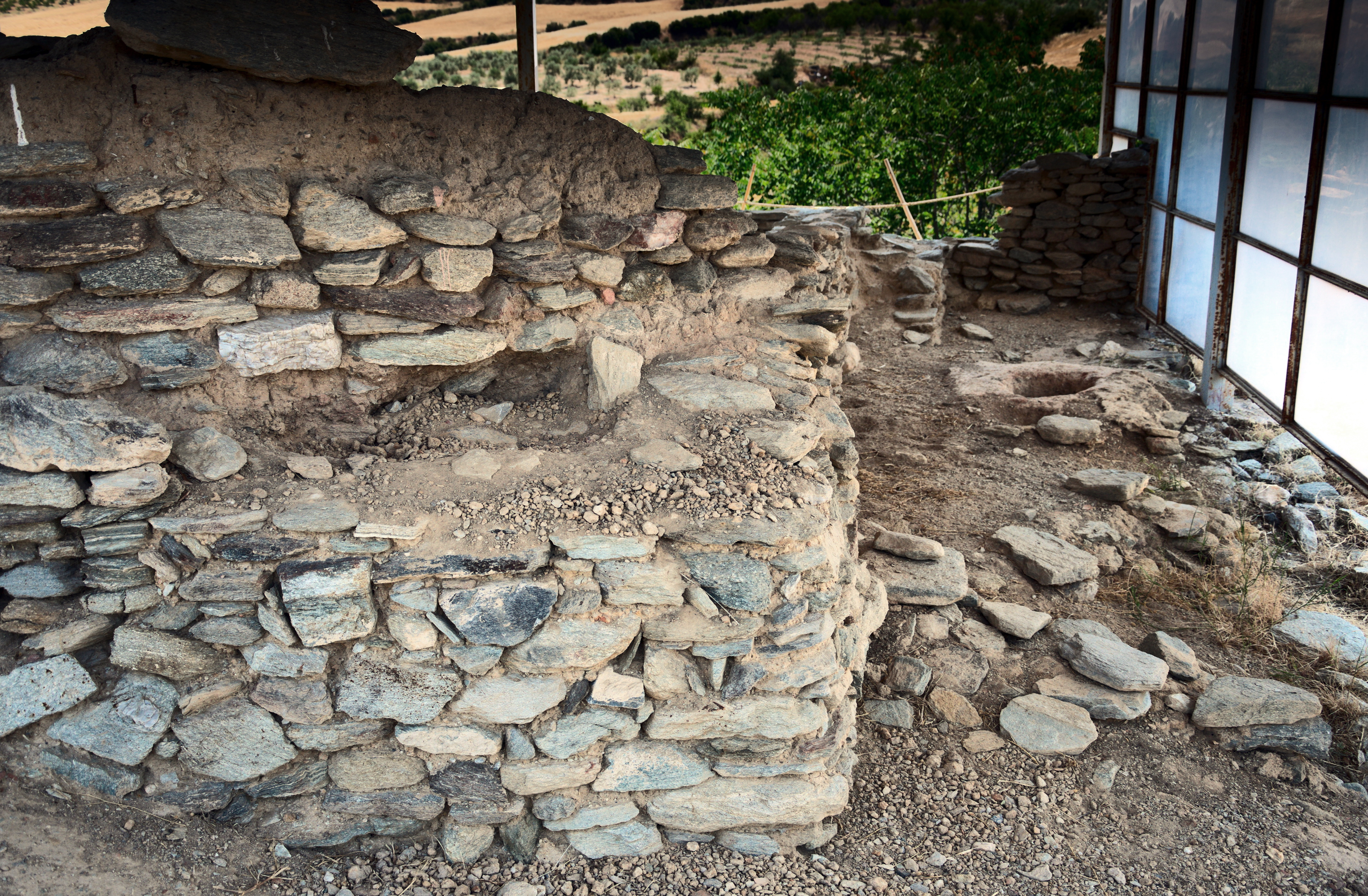 Οικία του Κεραμέα στο Σέσκλο«Οικία του Κεραμέα στο Σέσκλο»